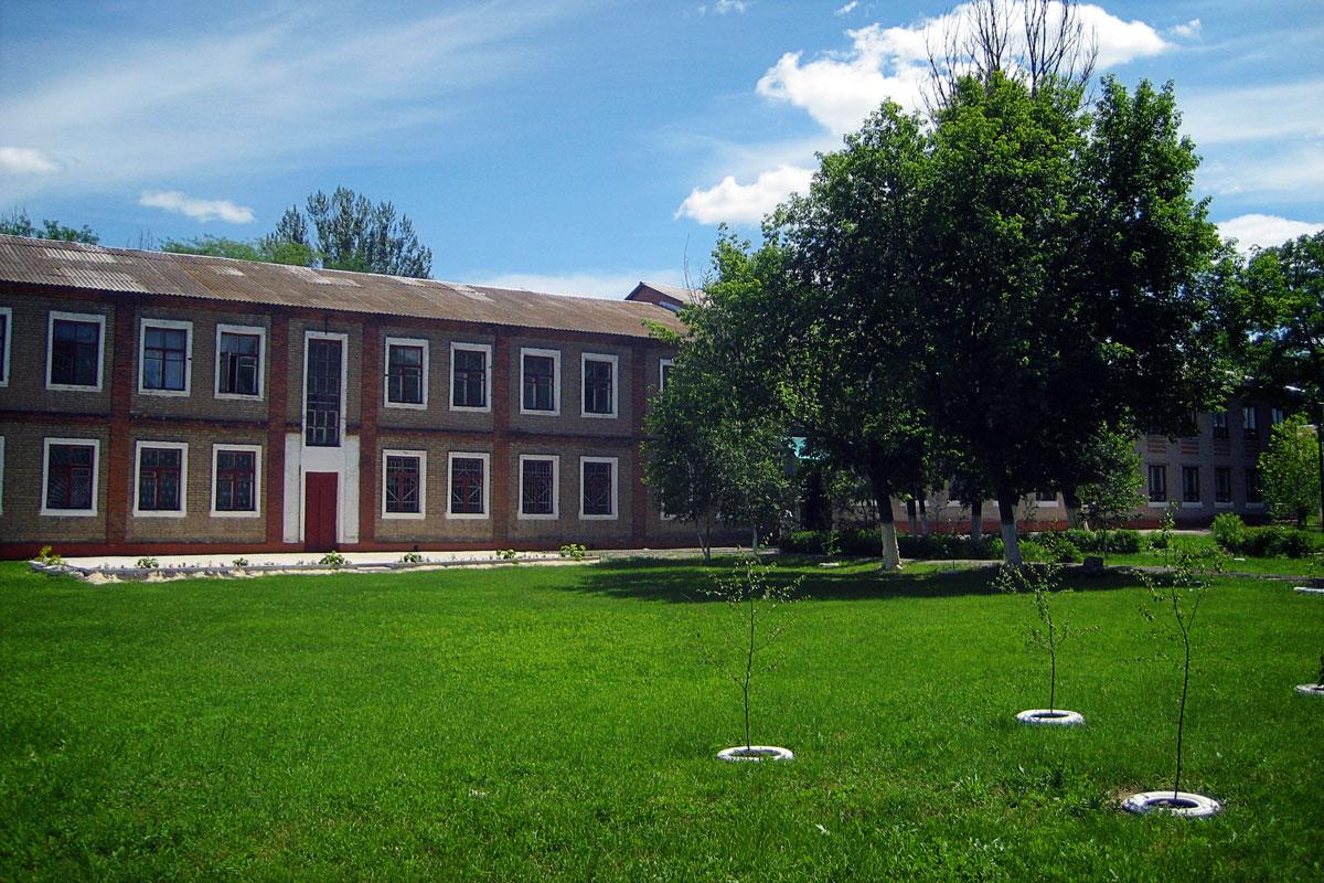 Будівля школи